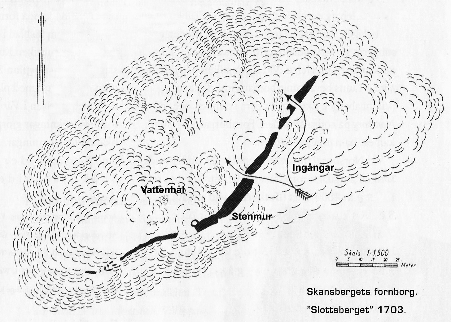 Skansberget Huddinge karta